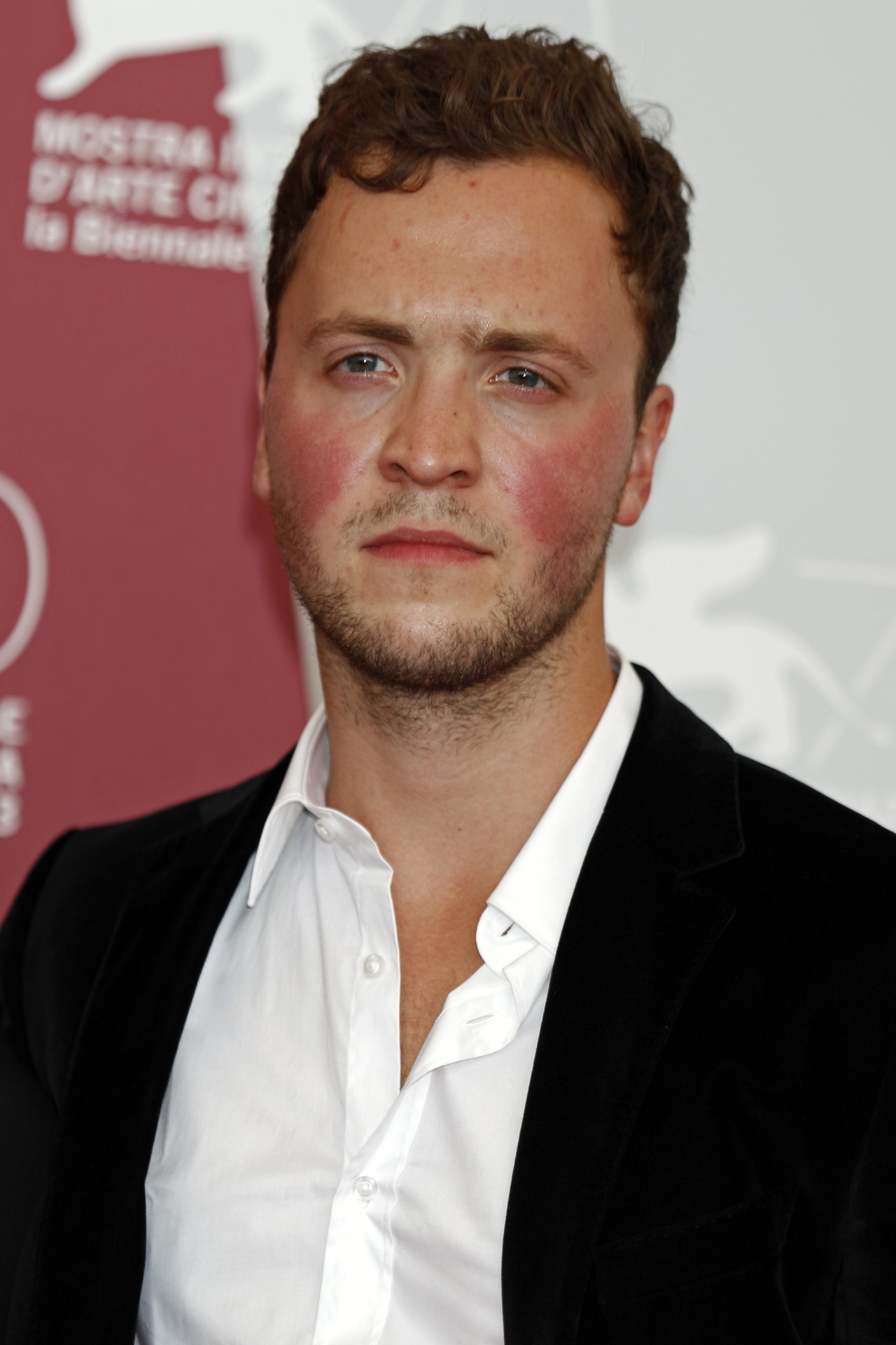 Maximilian Scheidt bei den 70. Internationale Filmfestspiele Venedig 2013